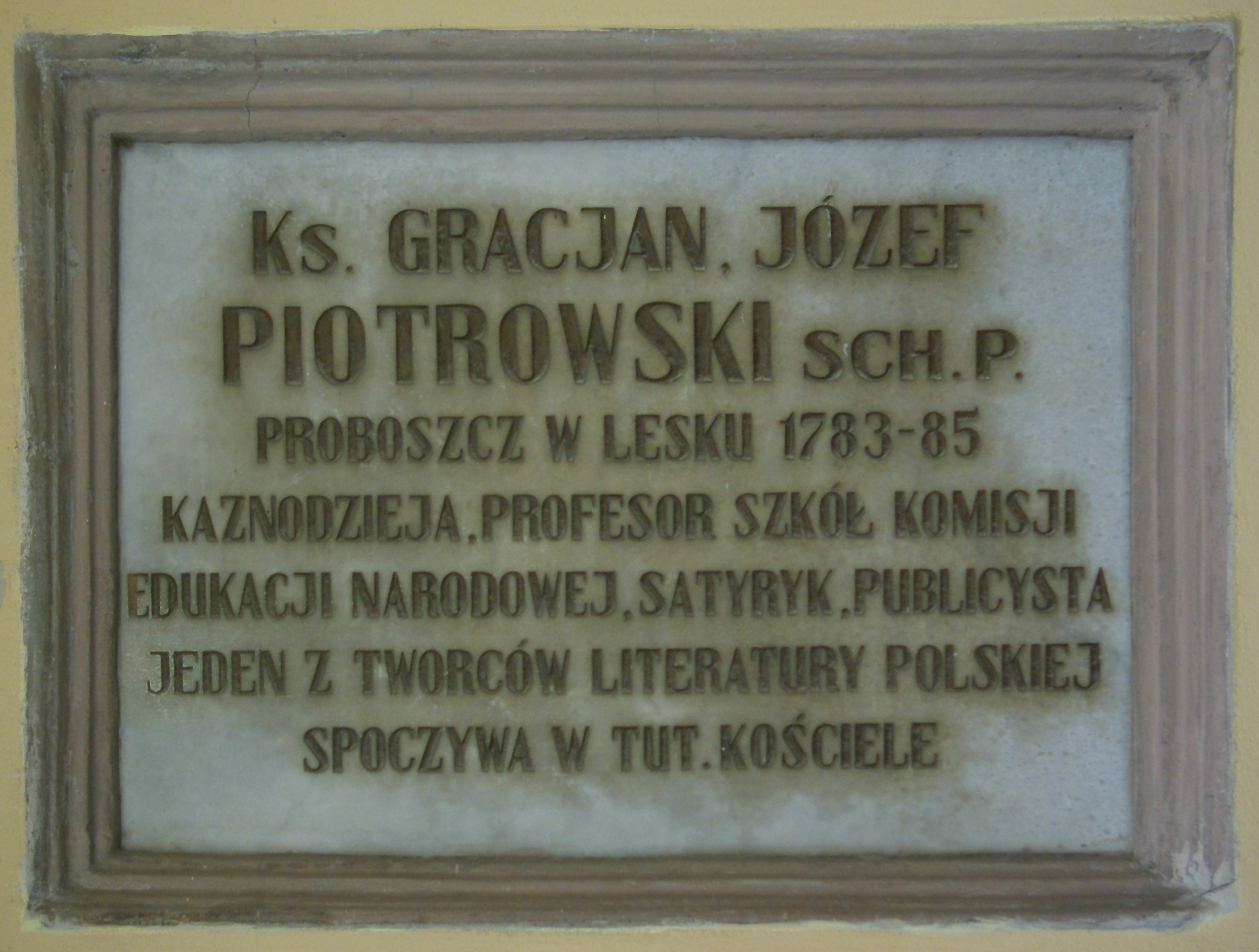 Epitafium ks. Gracjana Józefa Piotrowskiego w kościele Nawiedzenia Najświętszej Maryi Panny w Lesku.